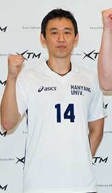 어게인 슈퍼리그! 한양대 vs 성균관대 미디어데이